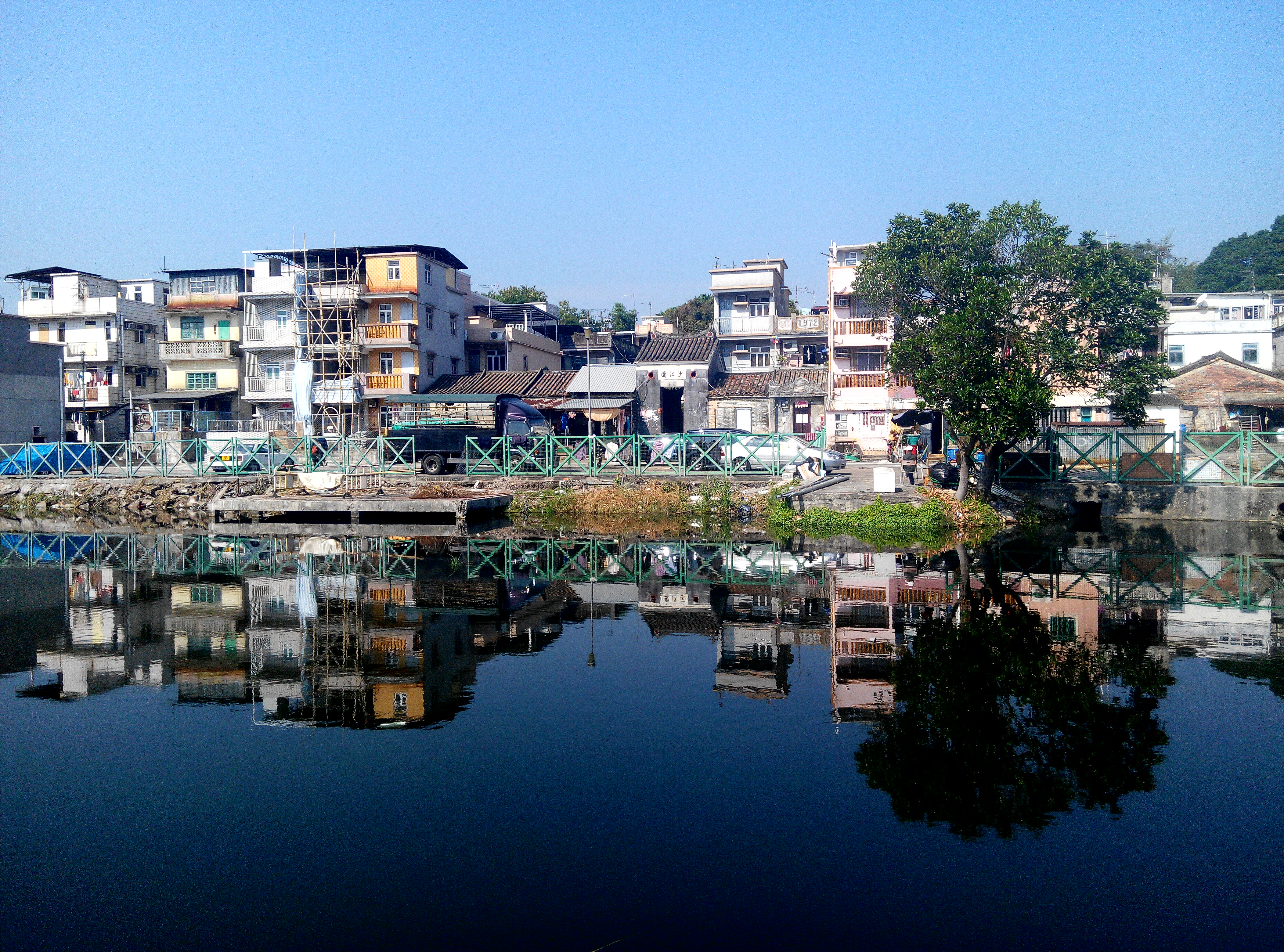 沙江圍影照風水塘